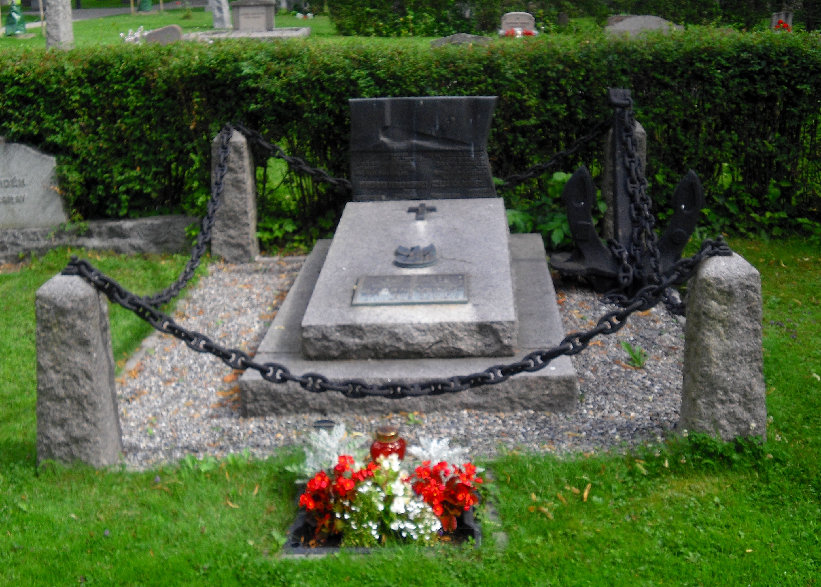 Grav med minnessten över de polska ubåtsbesättningar som var internerade i Mariefred under andra världskriet, Mariefreds kyrkogård